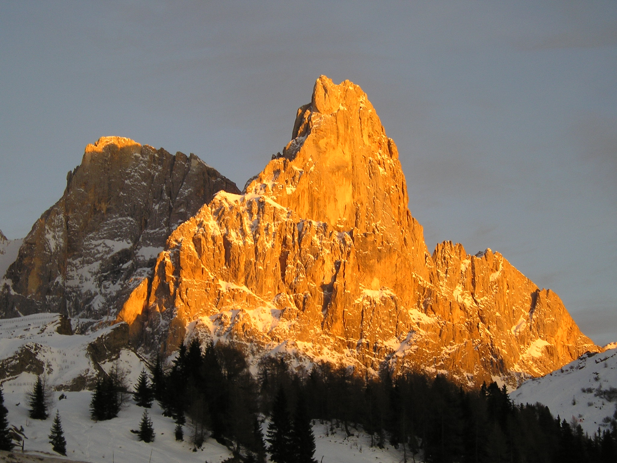 Veduta del Cimon Della Pala, Passo Rolle, Trentino, Italia